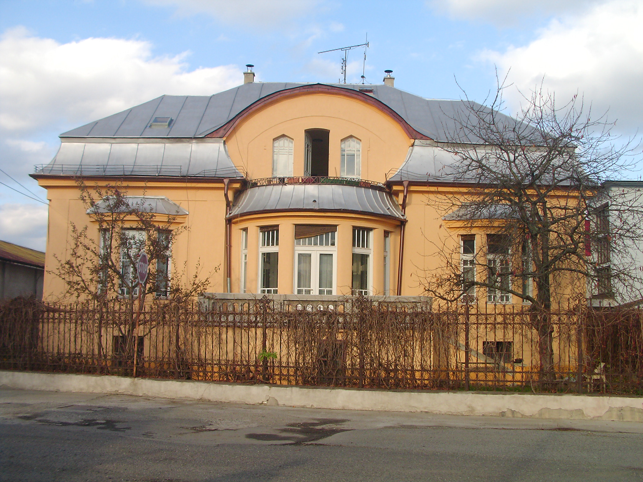 house of Lajos Pazerini, leather factory owner in Mikulas